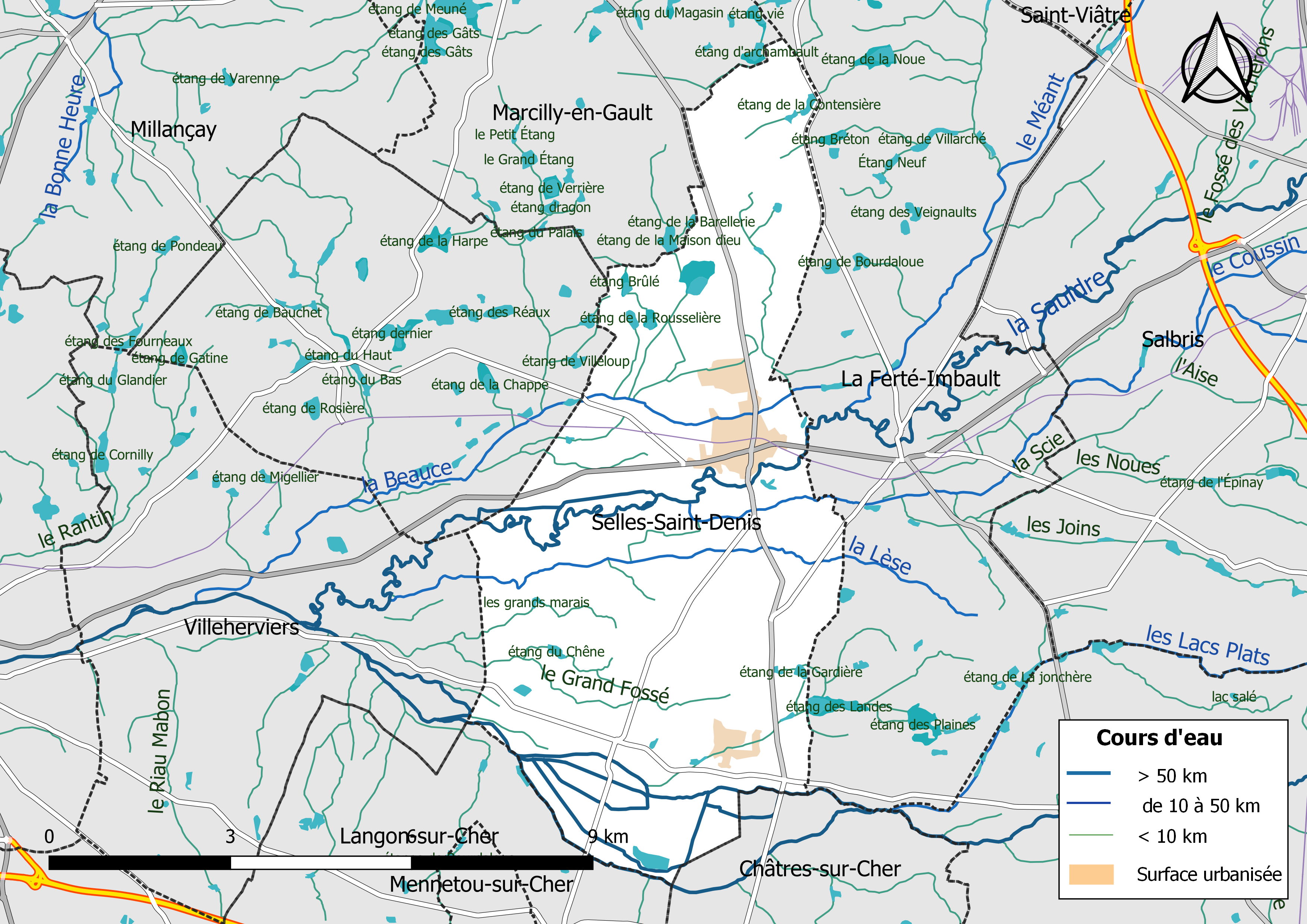 Carte du réseau hydrographique de la commune de Selles-Saint-Denis (Loir-et-Cher, France).